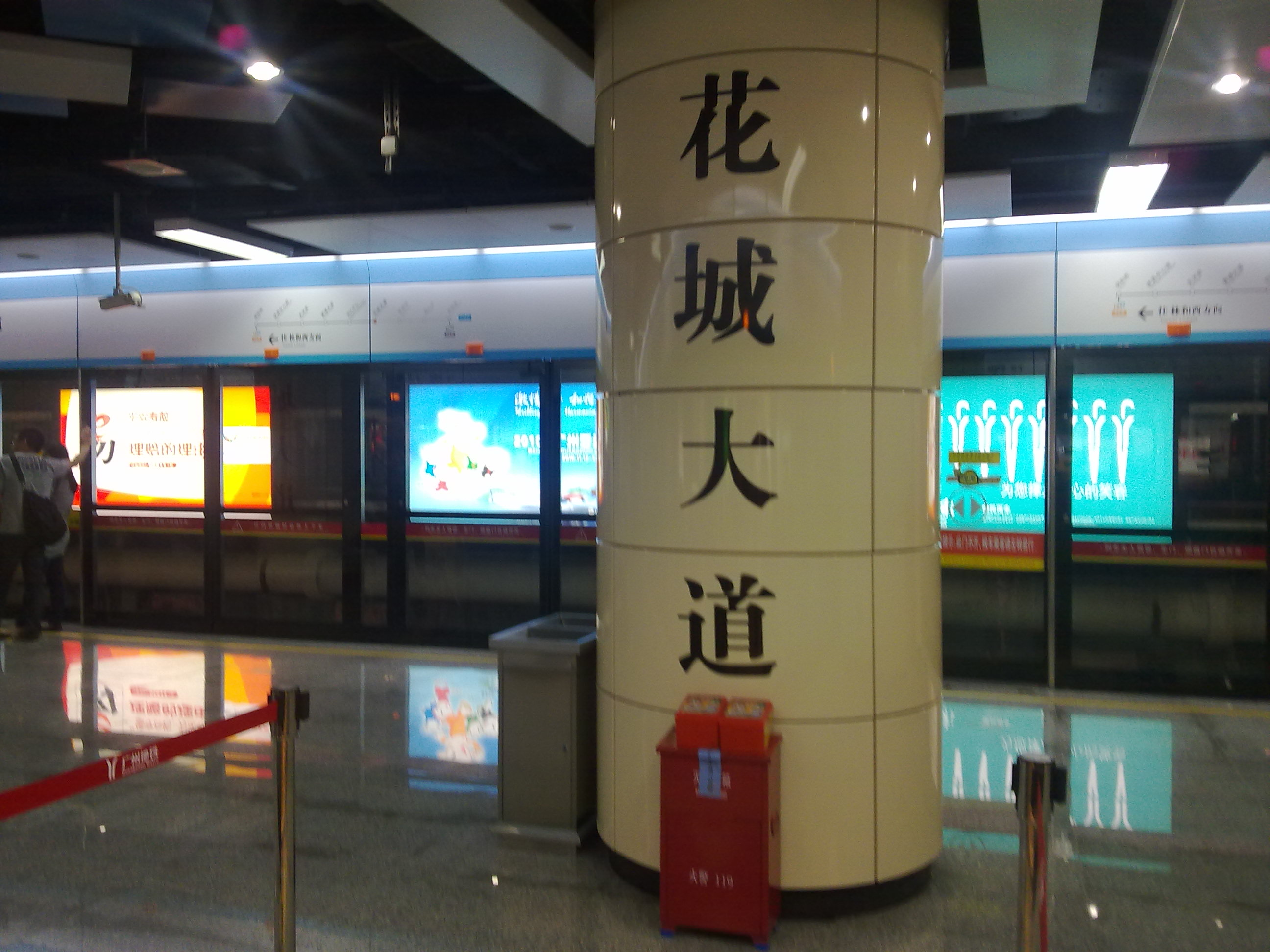 珠江新城旅客自動輸送系統花城大道站站台